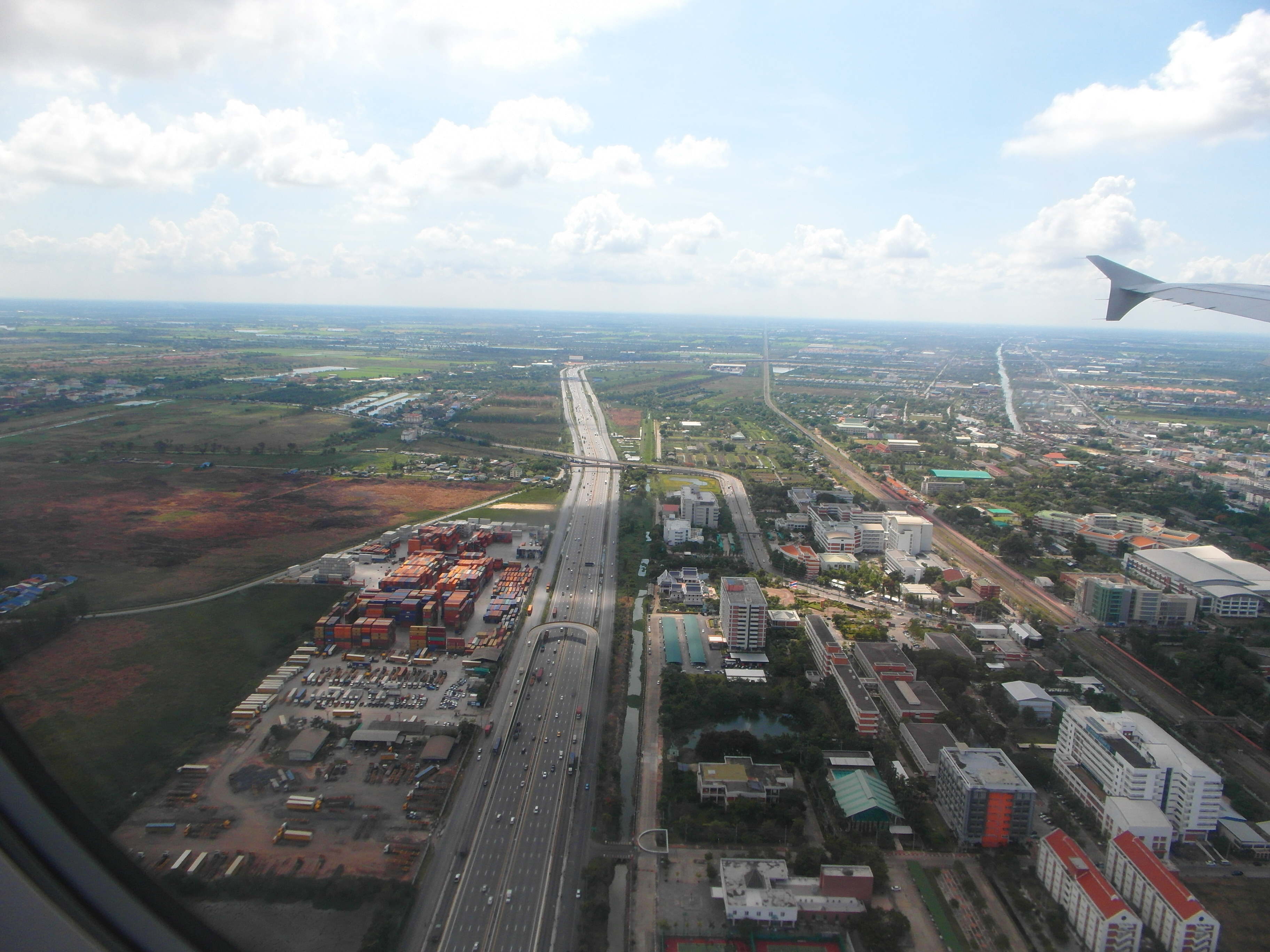 Бангкок май 2013